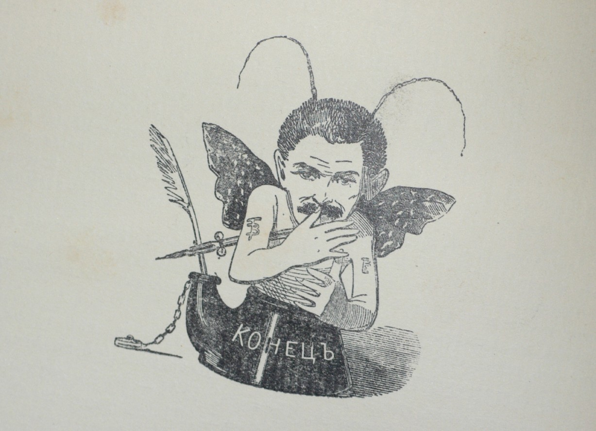 Концовка из Книги - автопортрет Тимма